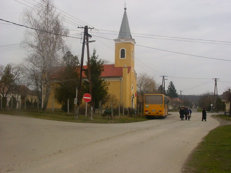 Nagydémi evangélikus templom